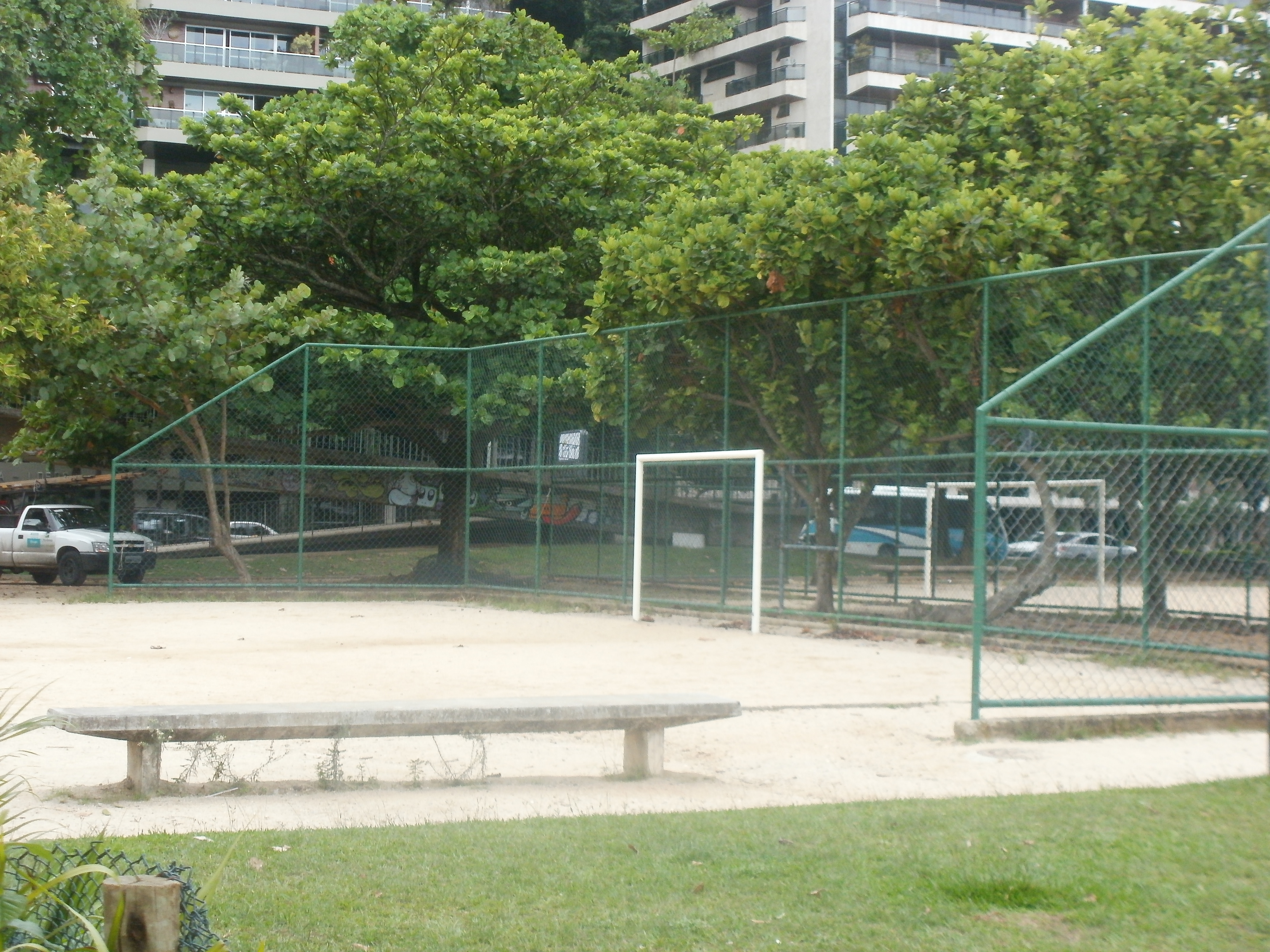 Parque do Cantagalo, no bairro Lagoa, na cidade do Rio de Janeiro, Brasil.